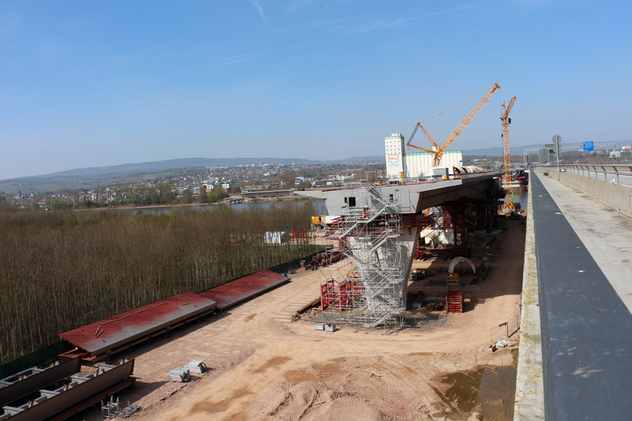 Neubau der Schiersteiner Brücke: Das Baufeld auf der Mombacher Seite von der alten Brücke aus gesehen